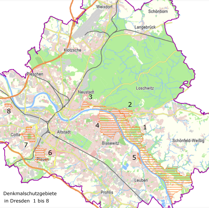 Denkmalschutzgebiete im Stadtgebiet von Dresden: 1 - Dresdner Elbhänge, 2 - Weißer Hirsch / Oberloschwitz, 3 - Preußisches Viertel, 4 - Blasewitz / Striesen, 5 - Dorfkern Laubegast, 6 - Plauen, 7 - Löbtau, 8 - Eigenheimsiedlung Briesnitz.